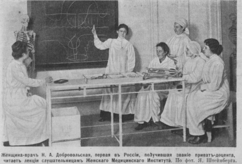 Надежда Александровна Добровольская-Завадская